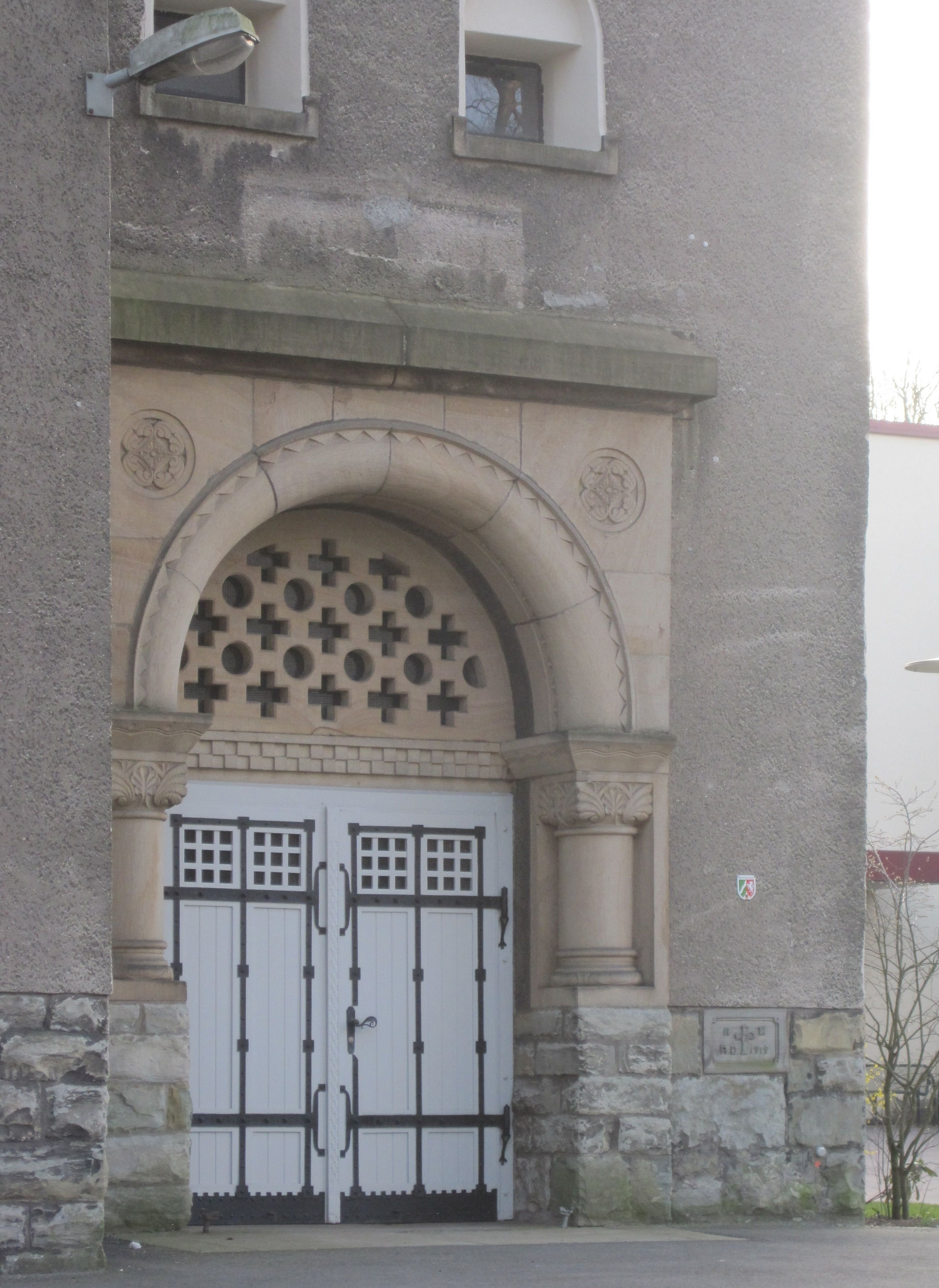 Das Foto zeigt das Eingangsportal der Kreuzkirche in Hamm-Bockum-Hövel.